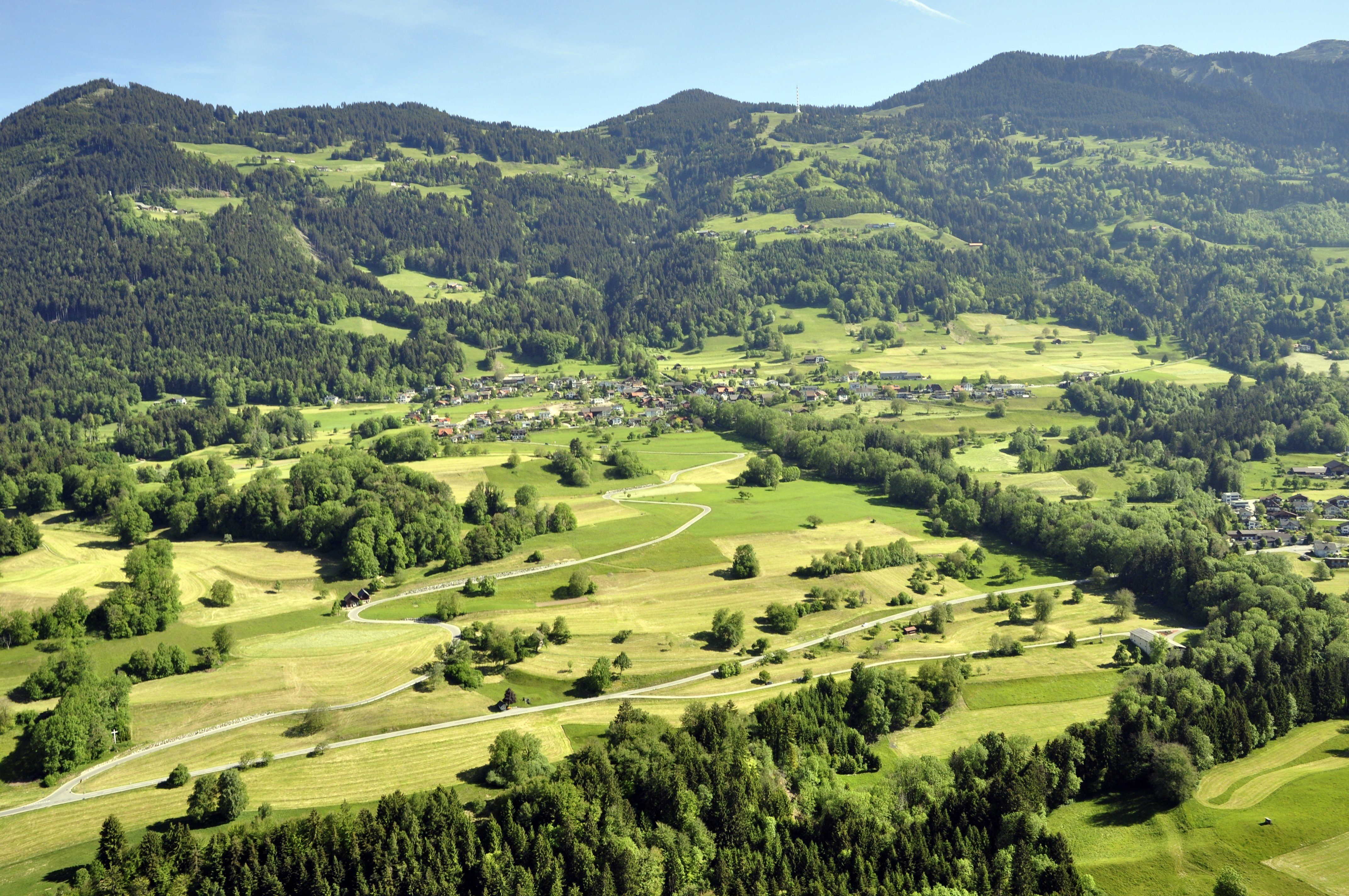 Luftbild mit Blick auf das Gemeindegebiet von Düns in Vorarlberg, gesehen von Süden.